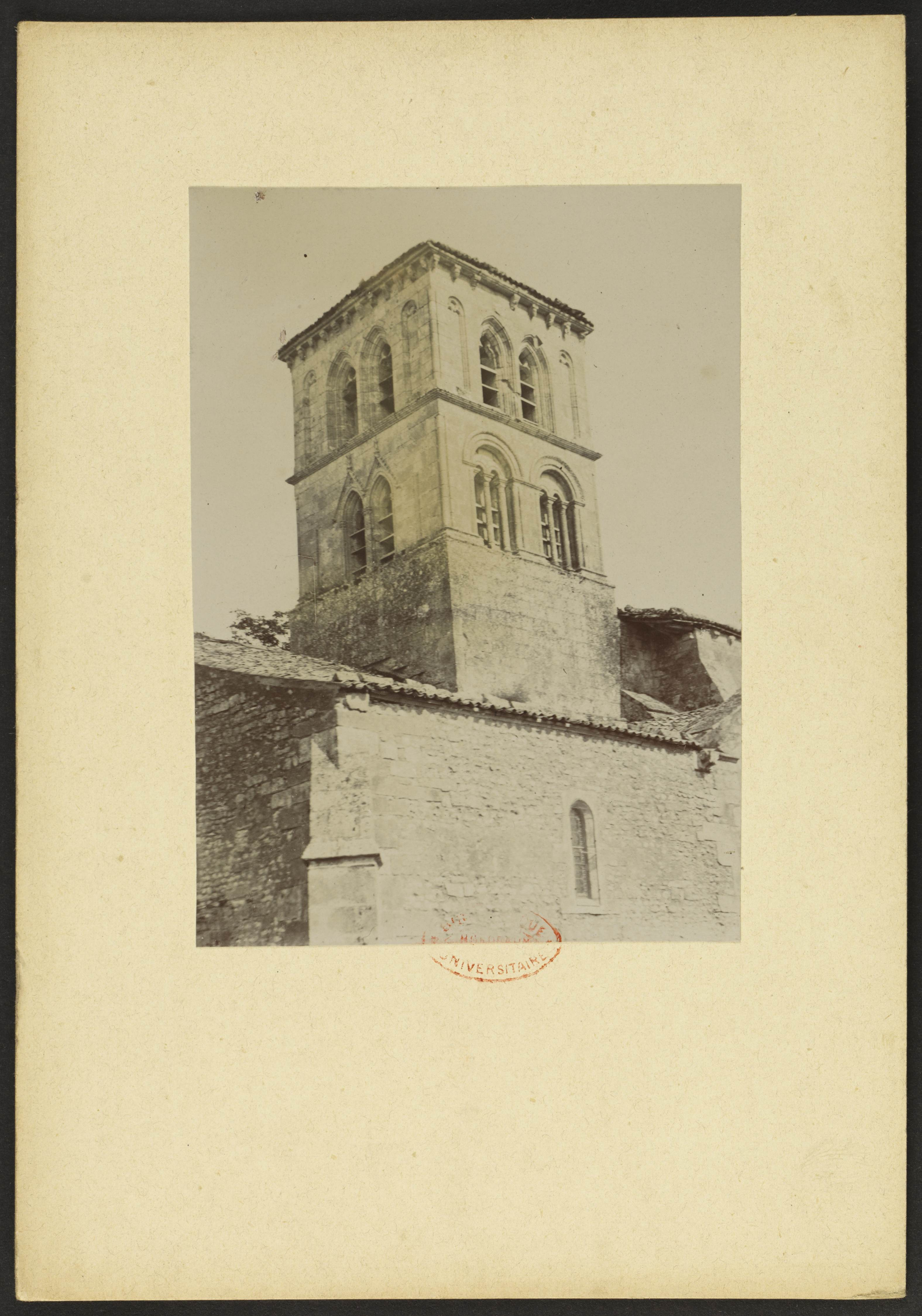 ?; clocher; sujet : Arthenac